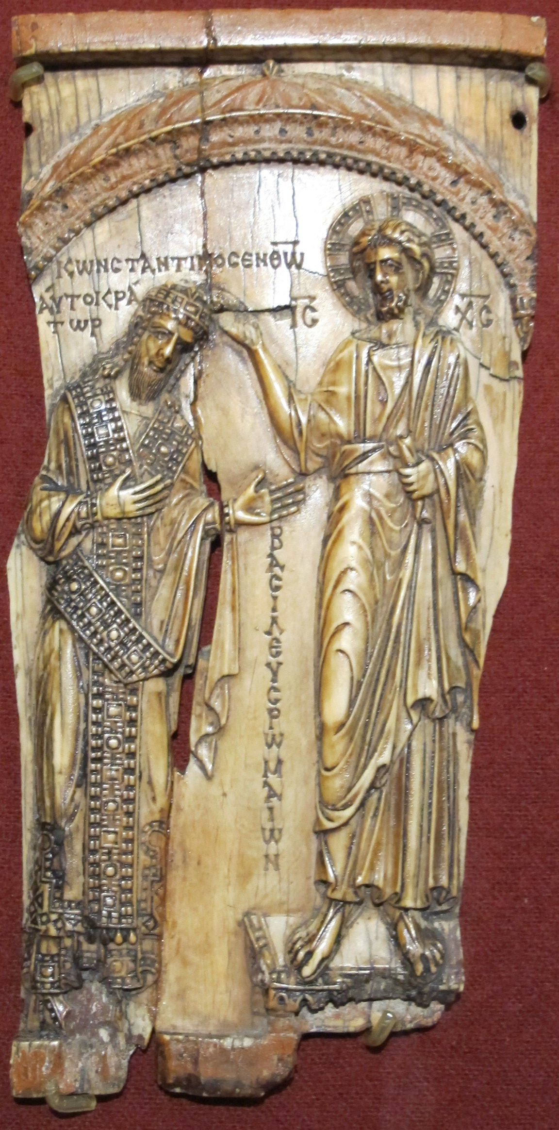 Arte costantinopolitana, frammento di placca con imp costantino VII porfirogenito incoronato da cristo, 945